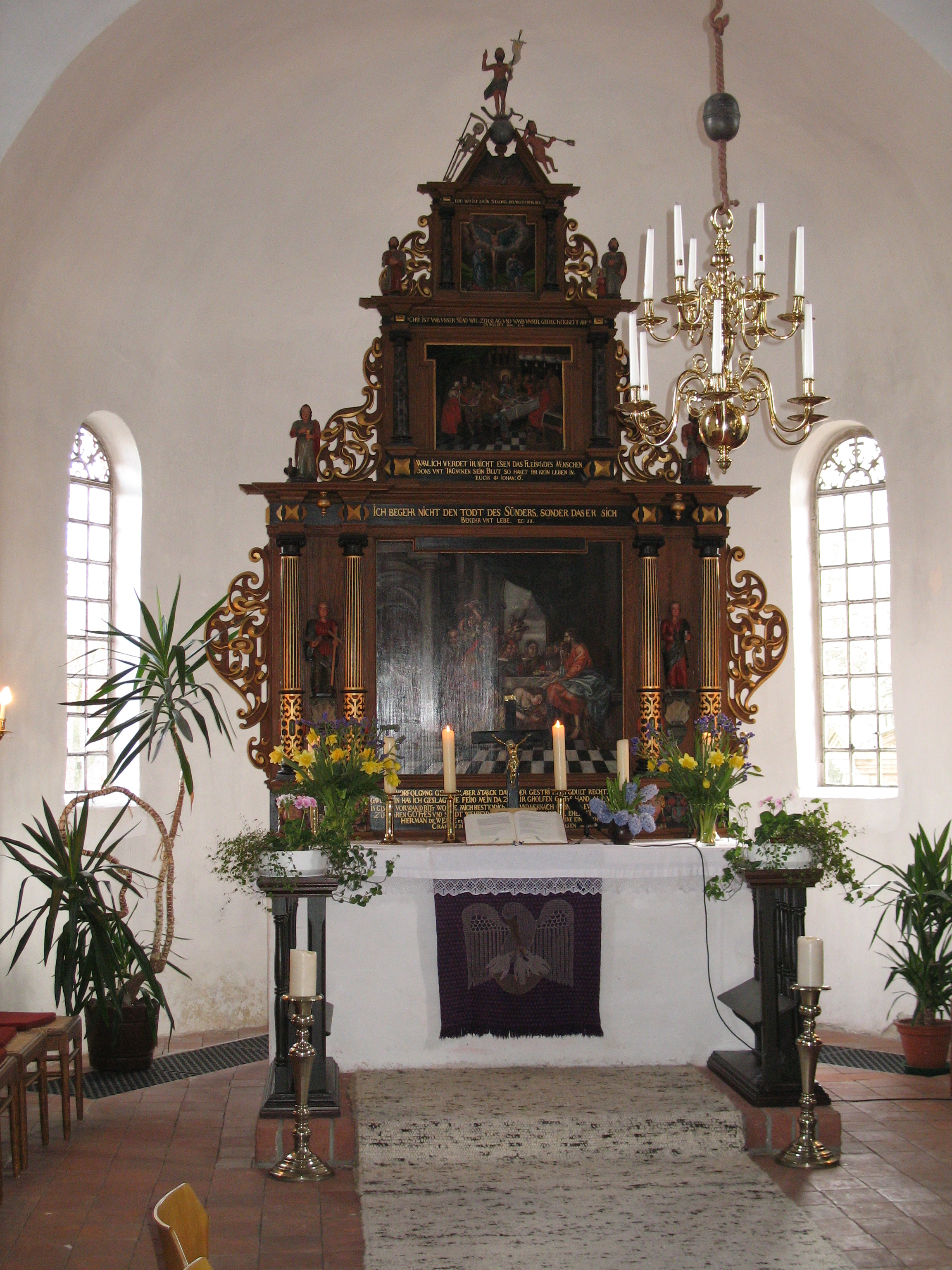 Altarretabel der Kirche St. Martin in Westerende-Kirchloog (bei Aurich, Ostfriesland, Niedersachsen, Deutschland), datiert 1652 (lt. Dehio: Bremen/Niedersachsen, München 1992)